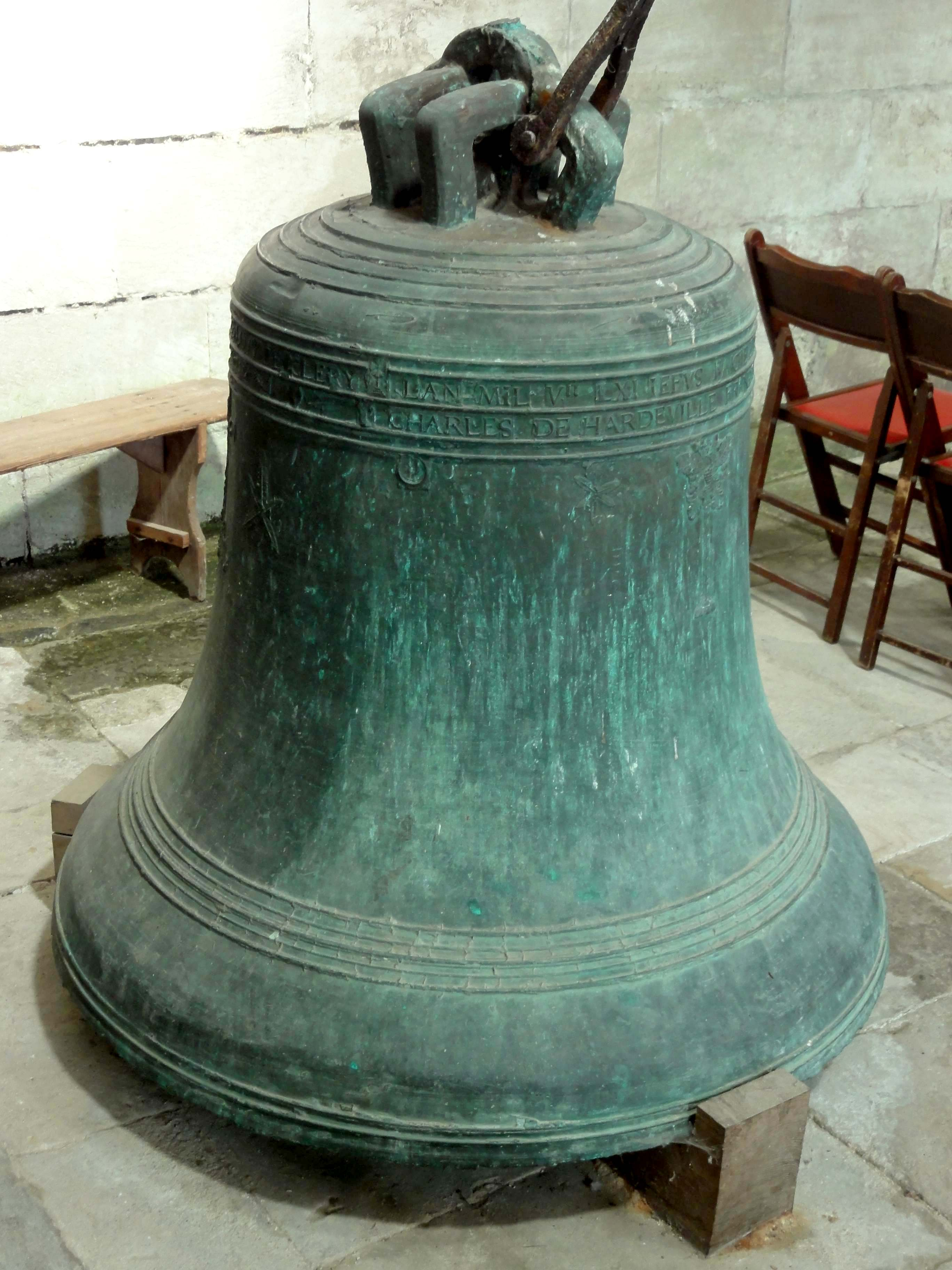 Cloche « Marie » de 1561.